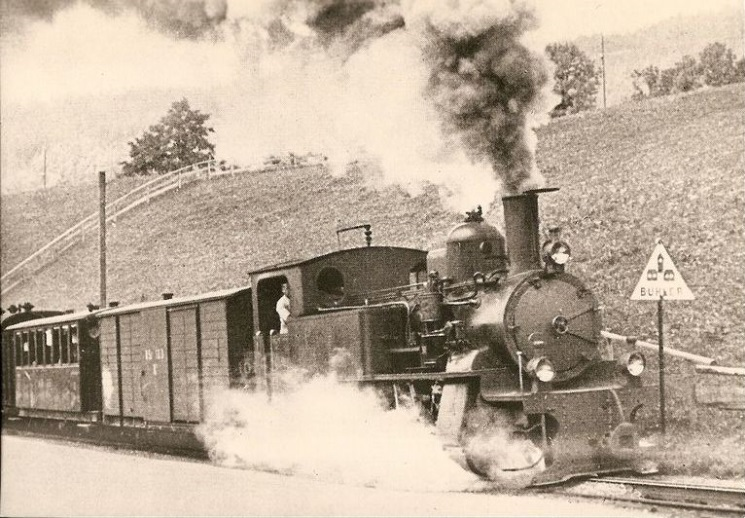 HG 2/4 „Säntis“ der Appenzeller-Strassenbahn (ASt) auf dem Zahnstangenabschnitt Strahlholz ob Bühler